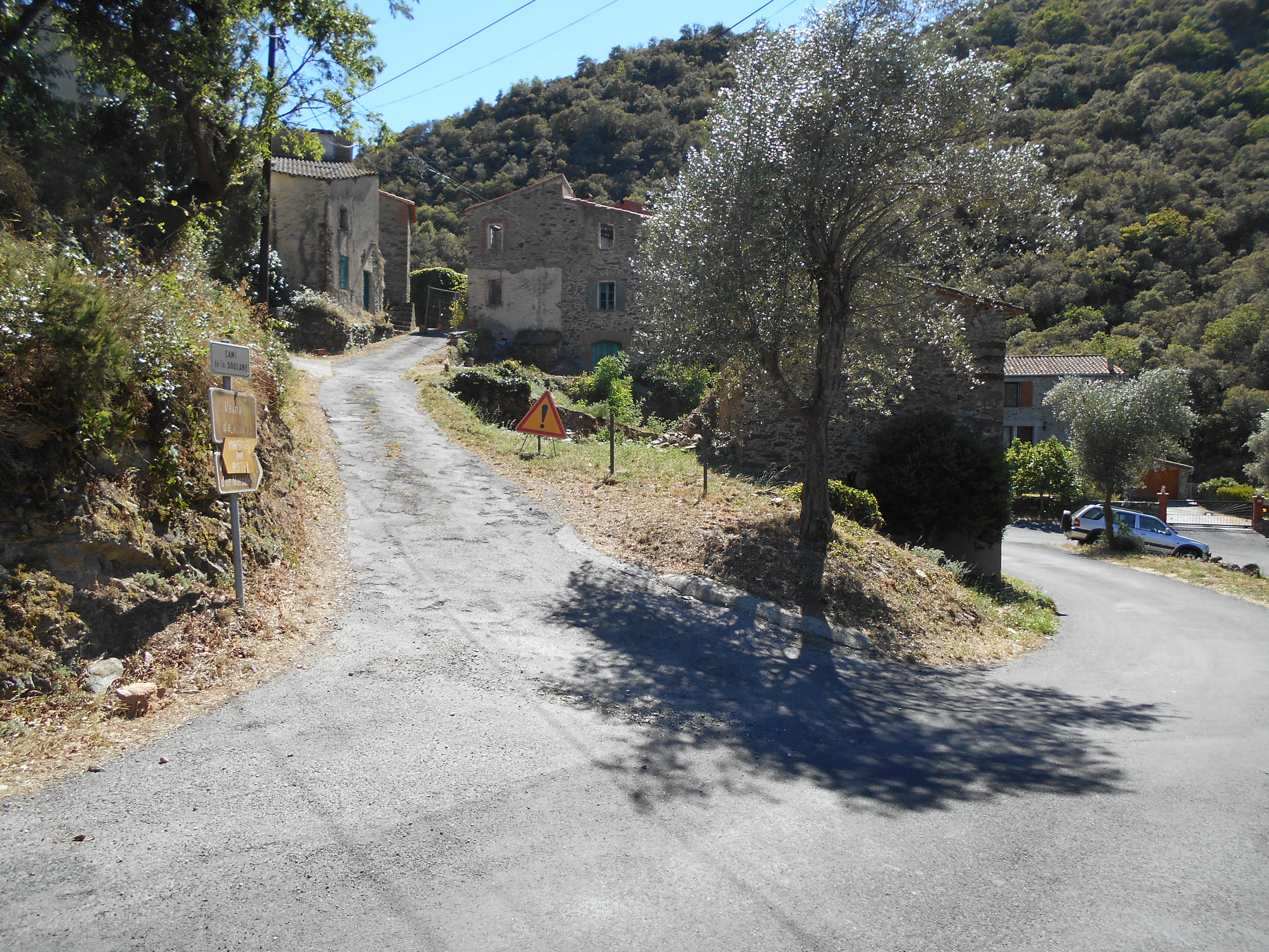 El Veïnat d'en Roc